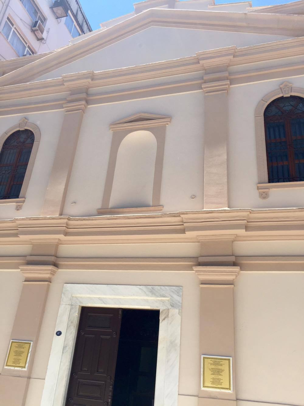 st maria dış cephe